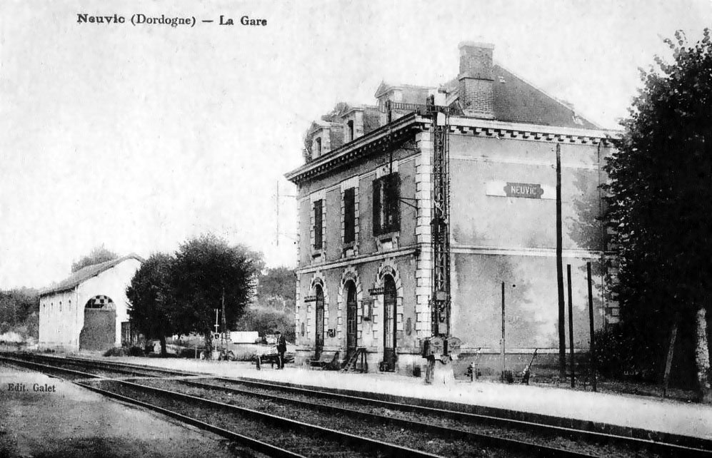 La gare de Neuvic (Dordogne). La carte postale du début des années 1900, montre les quais et voies, et le bâtiment voyageurs.